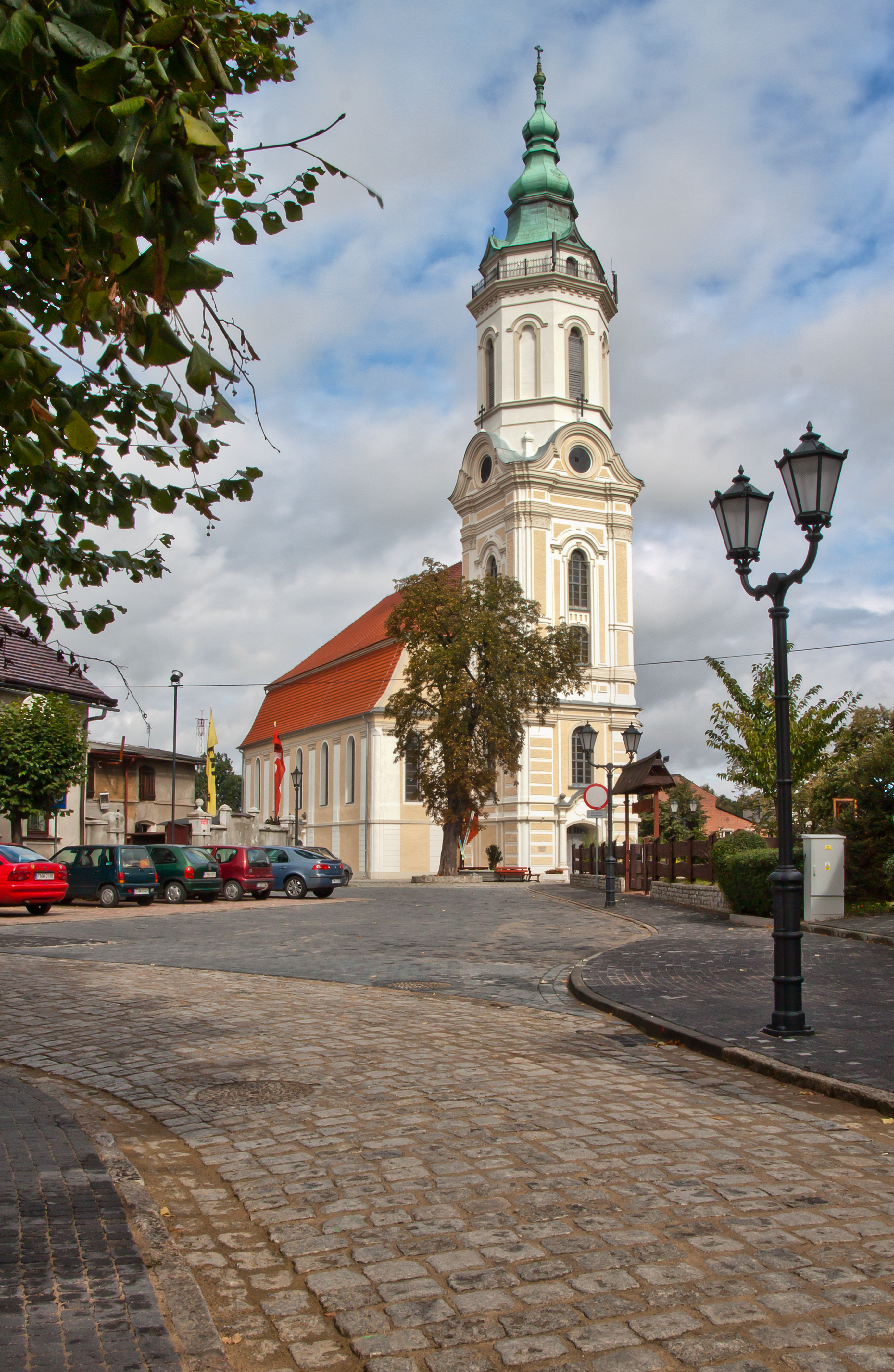 Nowe Miasteczko, pl. 3 Maja - dawny kościół ewangelicki, obecnie rzymskokatolicki filialny p.w. Opatrzności Bożej, mur., 1783-1784, 1887-1888, 1990 (zabytek nr 1541 z 15.02.1965)